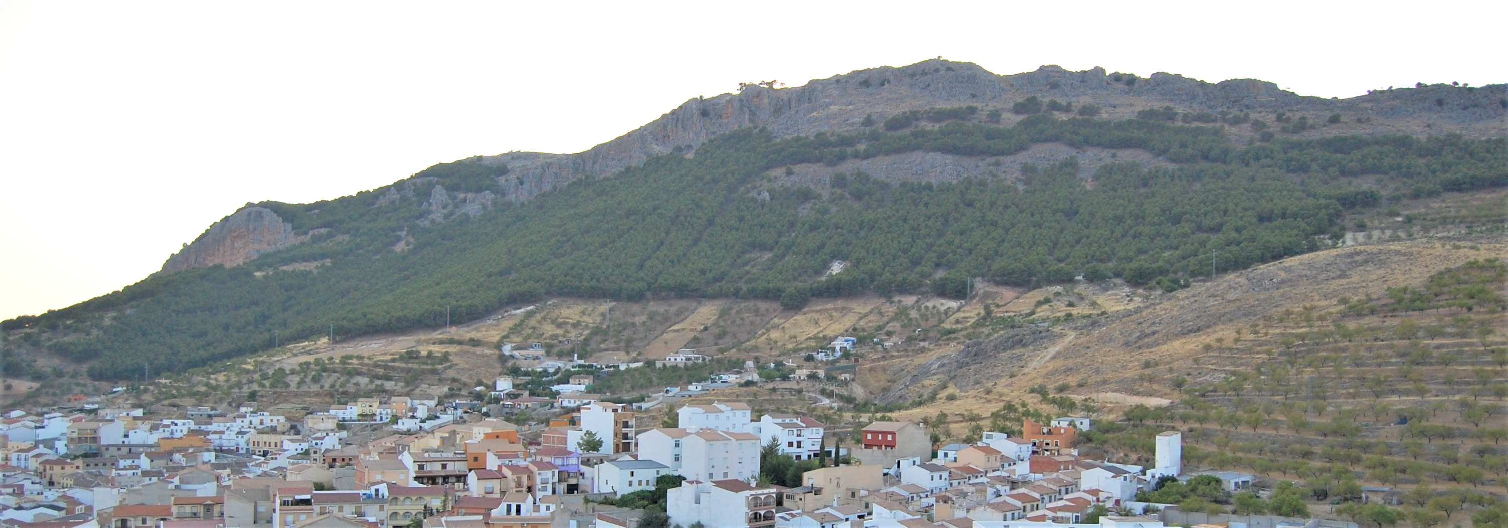 Serrezuela de Pegalajar (Provincia de Jaén - España).